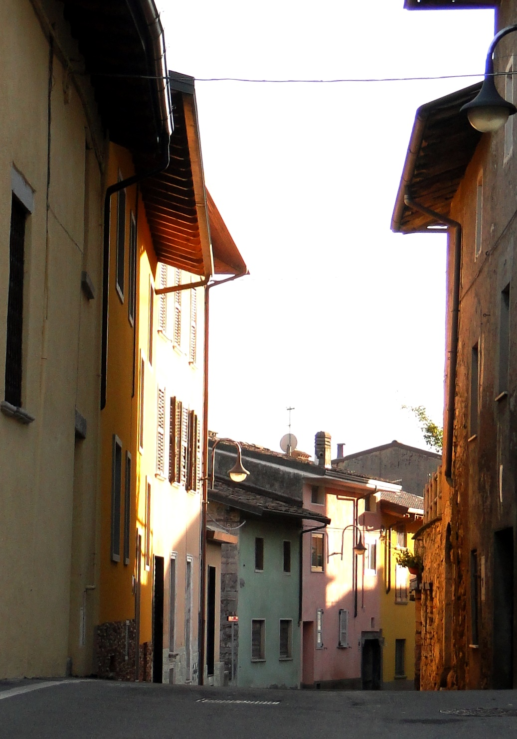 Colzate (BG). Centro storico